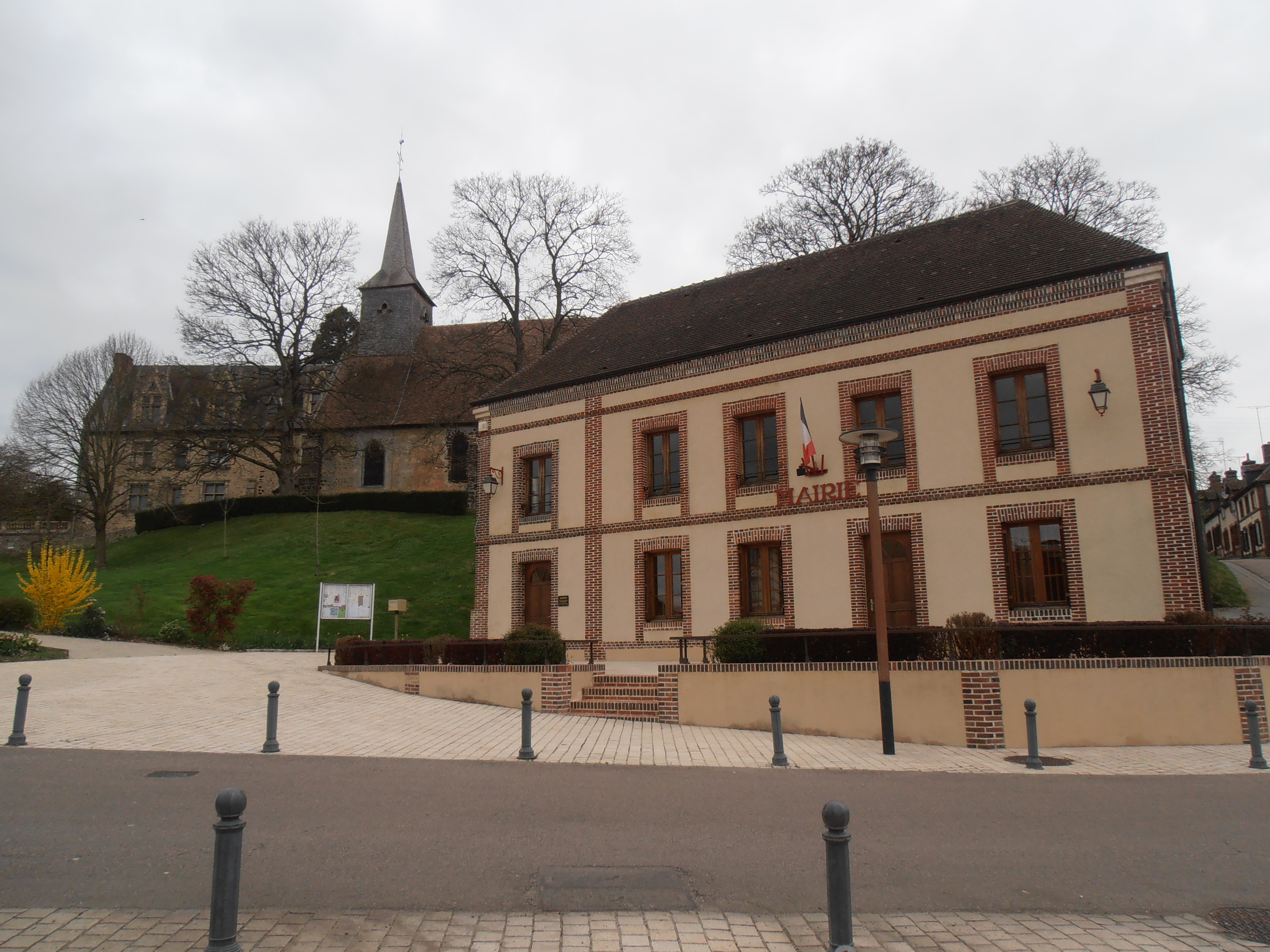 Orne, Saint-Sulpice-sur-Isle, Mairie, Eglise de l'ancien prieuré